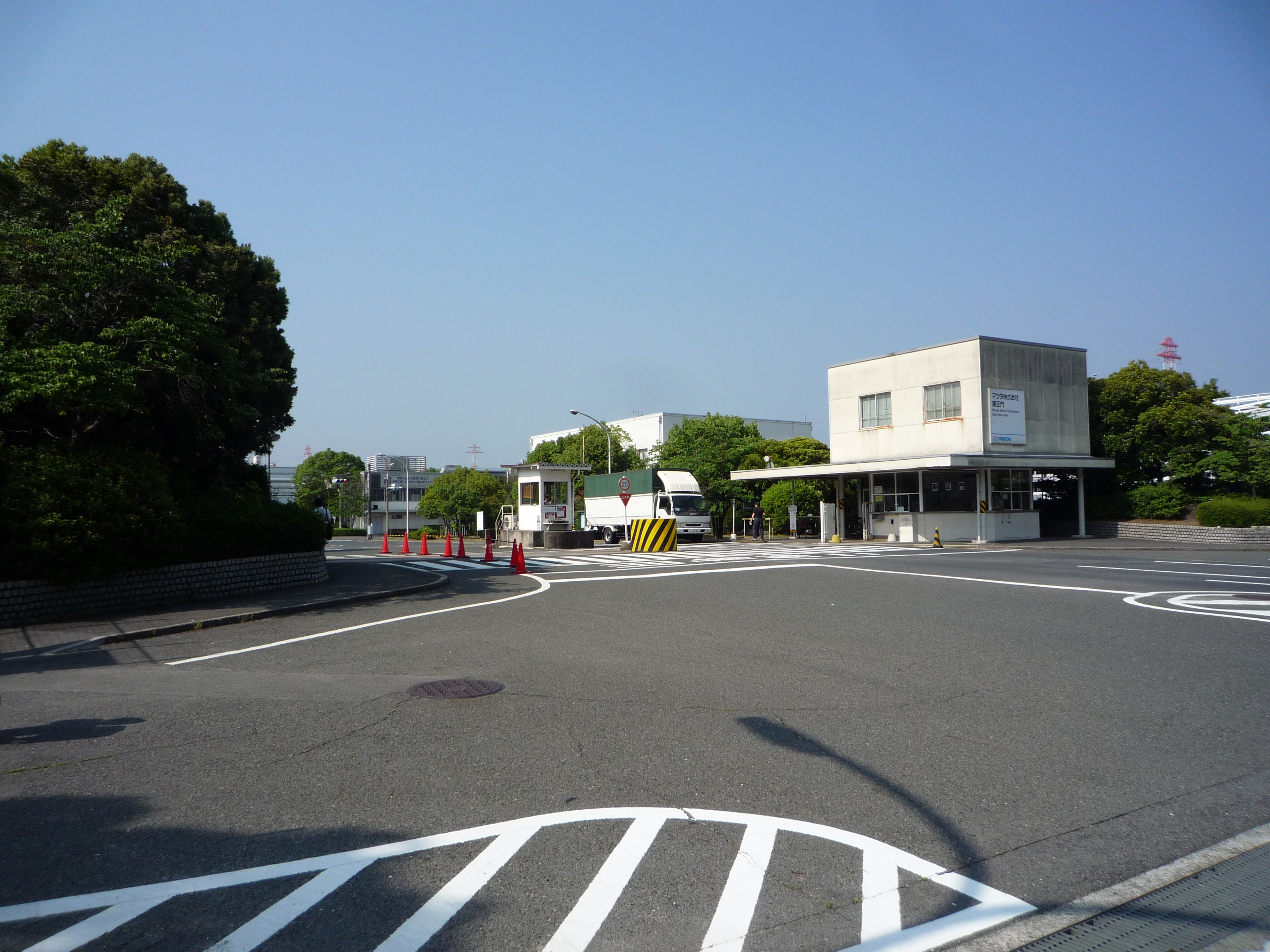 マツダ本社工場 東正門